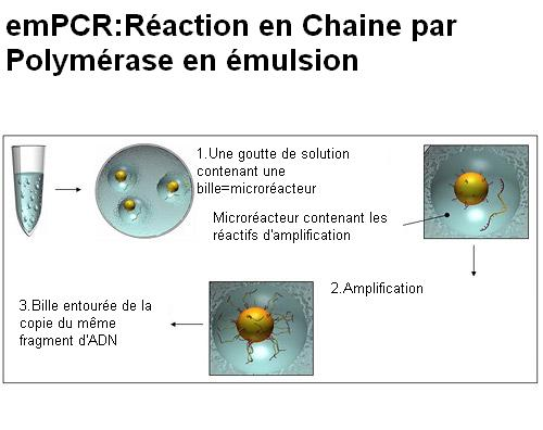 PCR en émulsion